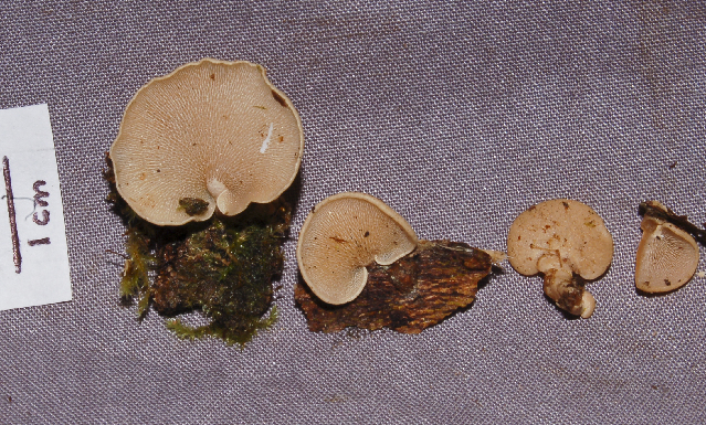 Dictyopanus pusillus